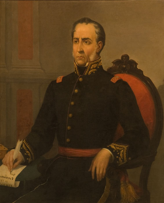 Óleo sobre tela del Gobernador Martín Rodríguez, patrimonio del Banco Provincia de Buenos Aires. Fuente